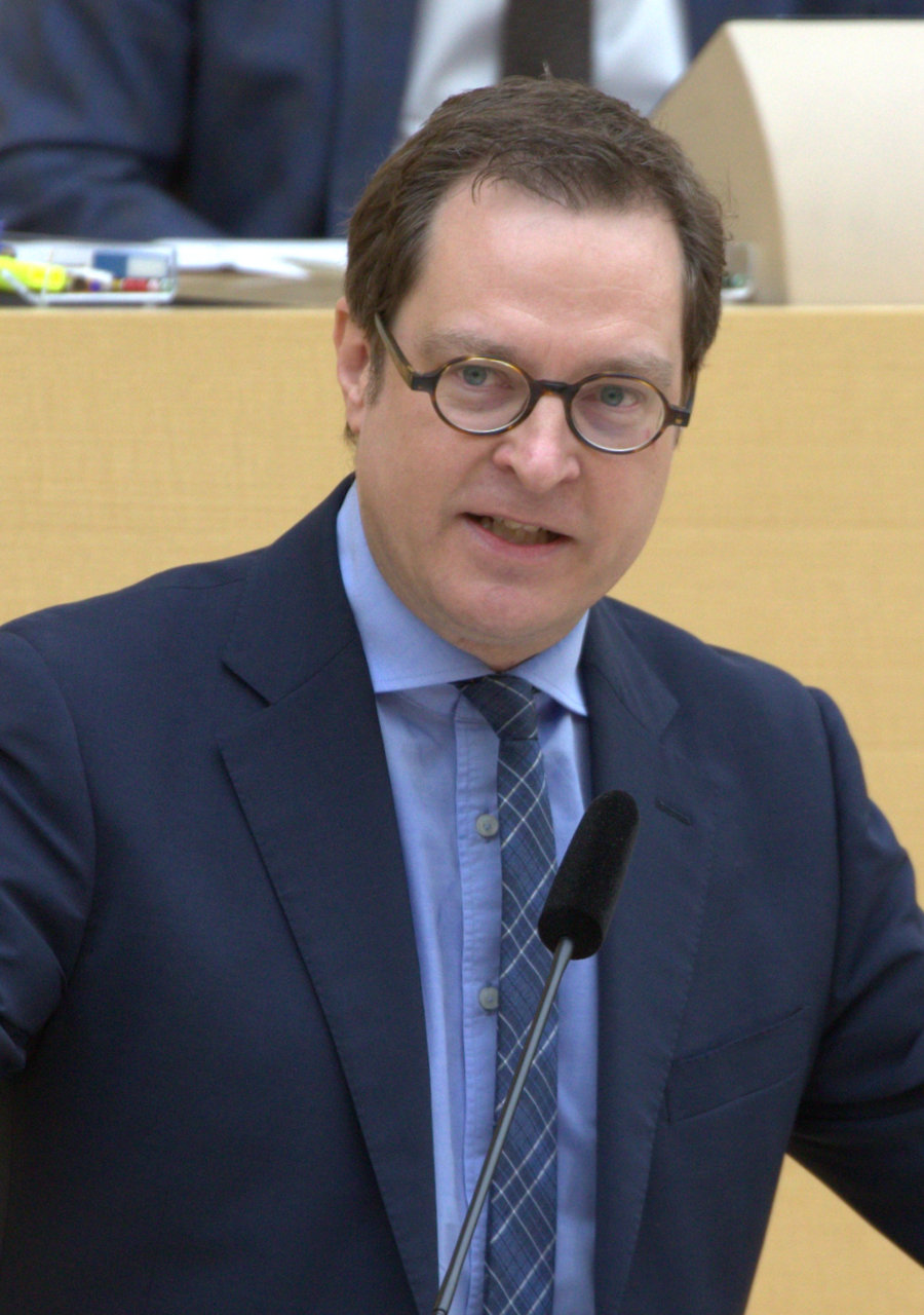 Dr. Martin Andreas Huber, deutscher Politiker (CSU). Hier am 21. Februar 2019 während der 'Aktuellen Stunde' im Bayerischen Landtag. Titel des Werks: "Dr. Martin Huber (CSU) - 02/2019"